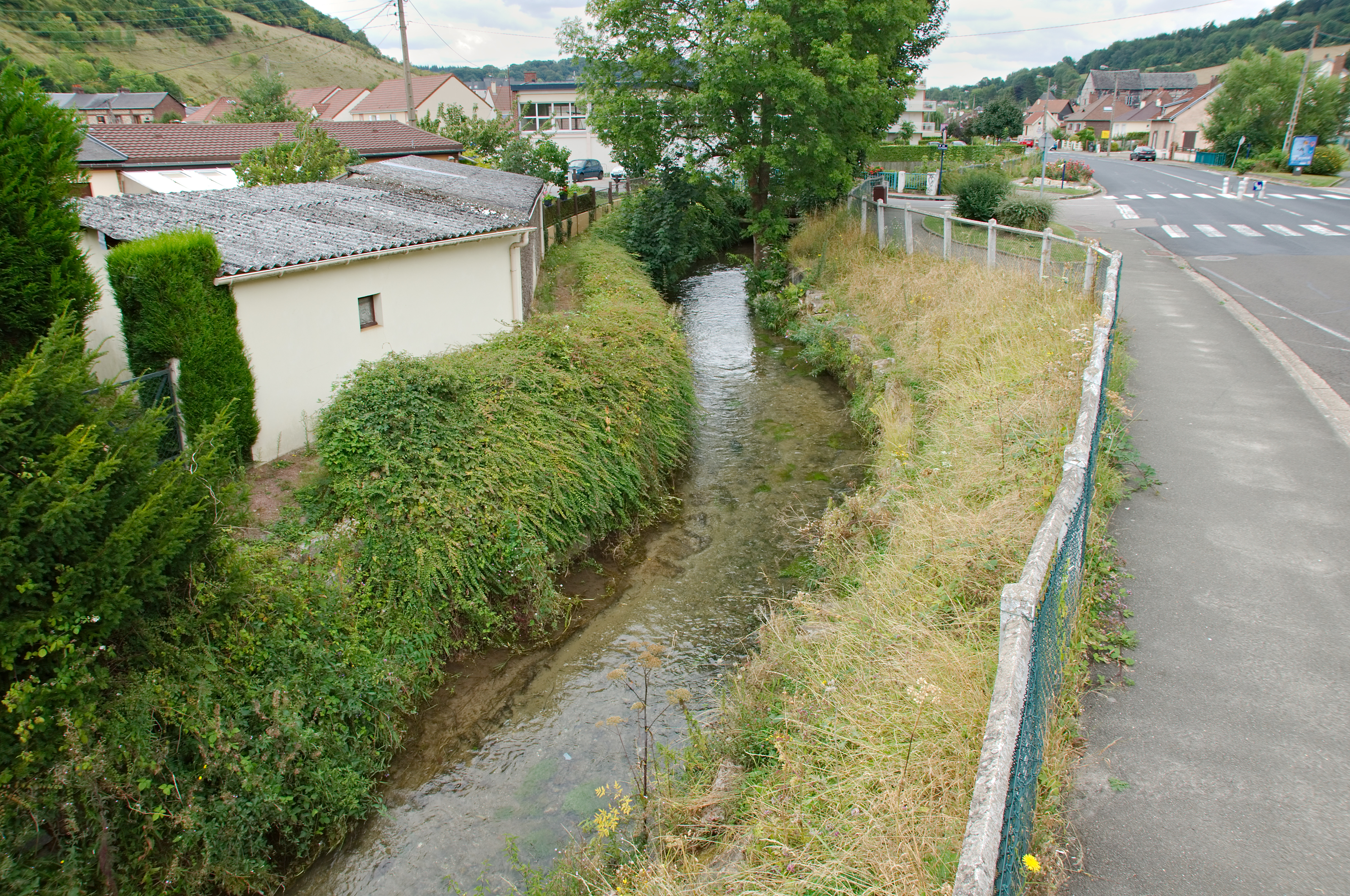 La rivière Aubette route de Lyons-la-Forêt à Saint-Léger-du-Bourg-Denis